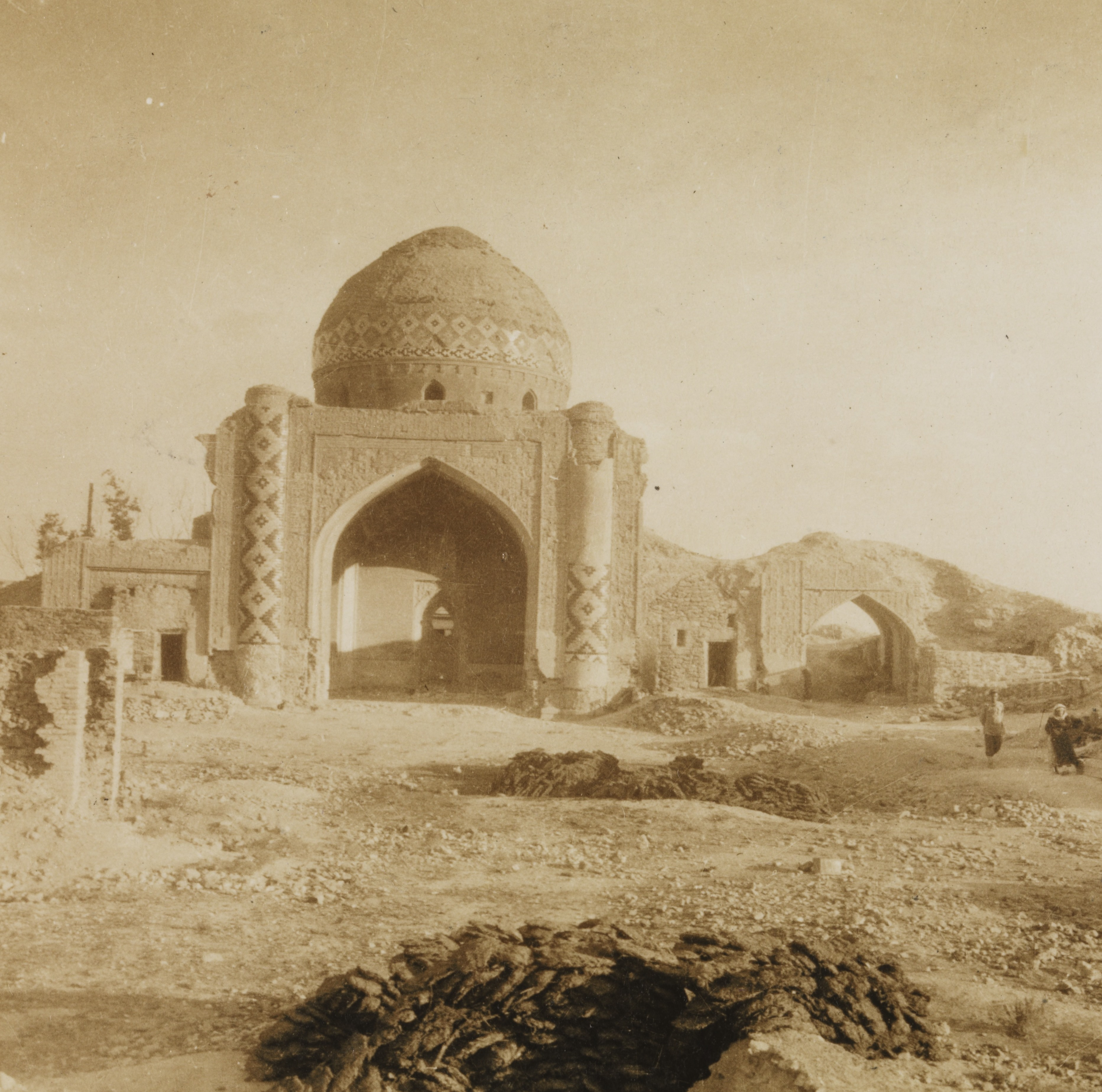 Ruin av den persiske moské i festningsmuren. Ett av bildene fra reisen gjennom Armenia i perioden 7 juni til 2 juli 1925. På anmodning fra Det Internasjonale Arbeidsbyrå (ILO) og Folkeforbundet reiste Fridtjof Nansen sammen med en utpekt kommisjon sakkyndige for å besøke landet og undersøke planer for kunstig vanning av ørkenområder med tanke på å overføre armenske flyktninger dit. Depicted place: Armenia, Jerevan